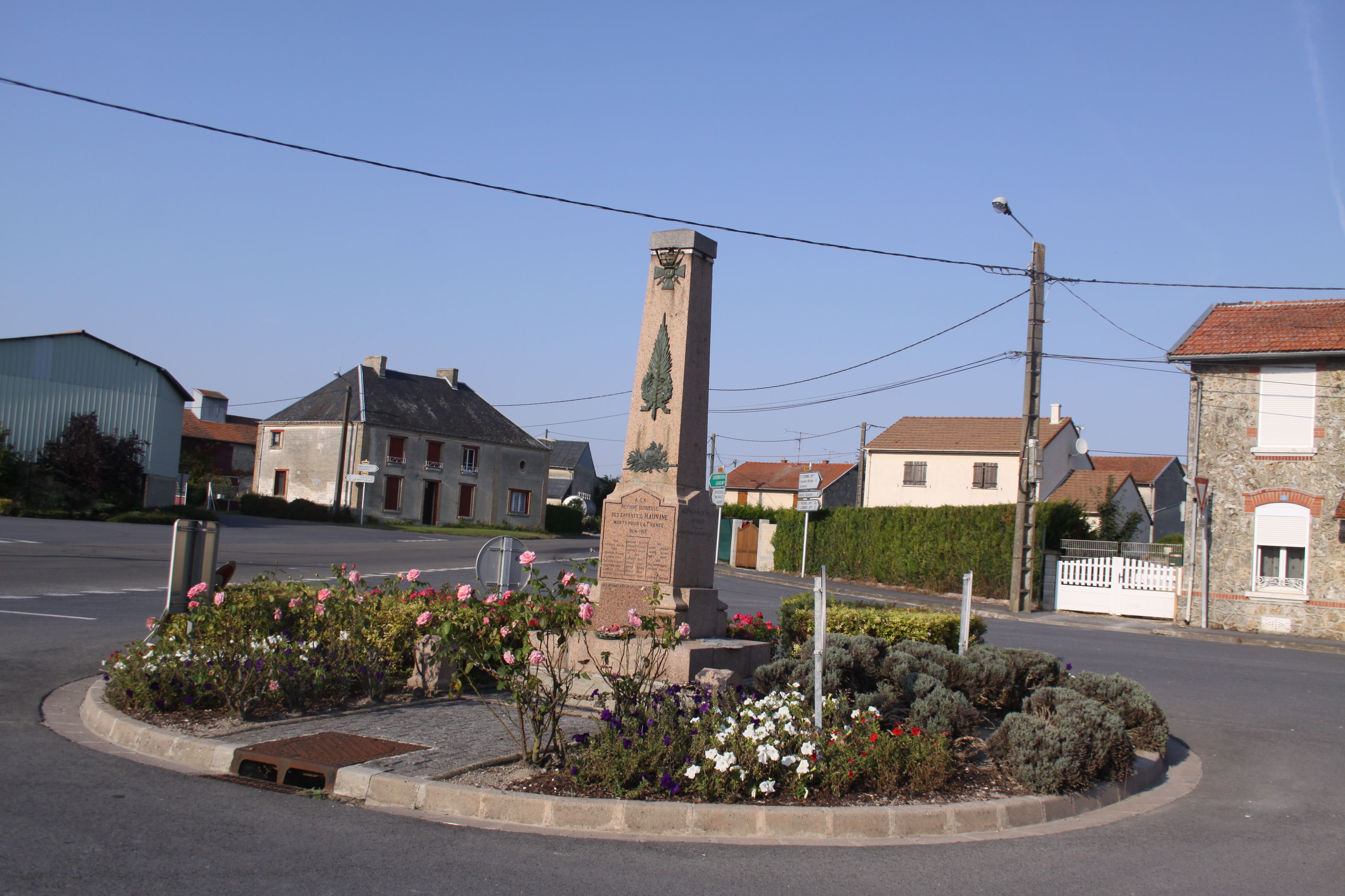 Village Ardennais